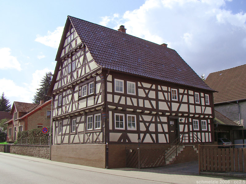 Haus Ebert-Nickel von 1514 in Sinsheim-Dühren, Karlsruher Straße 60